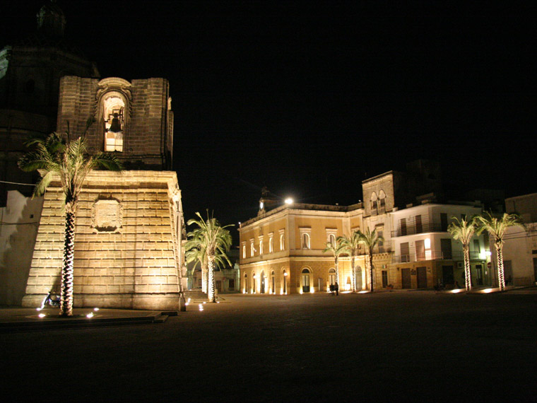 Piazza Libertà Campi Salentina